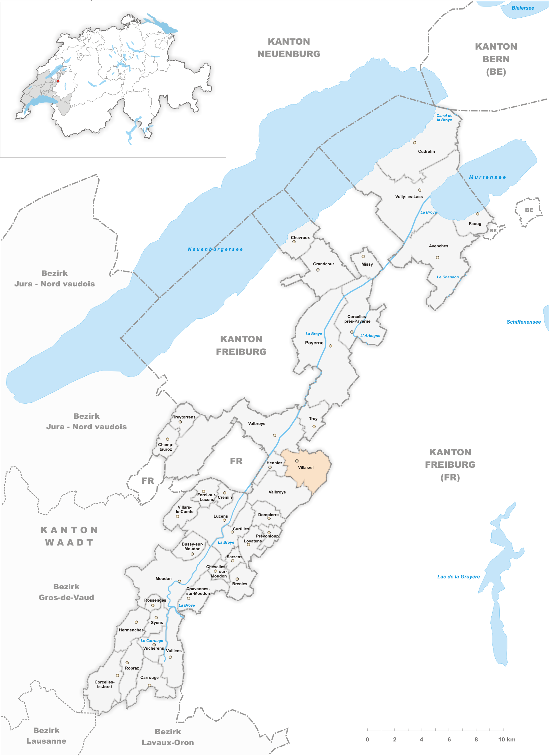 Municipality Villarzel